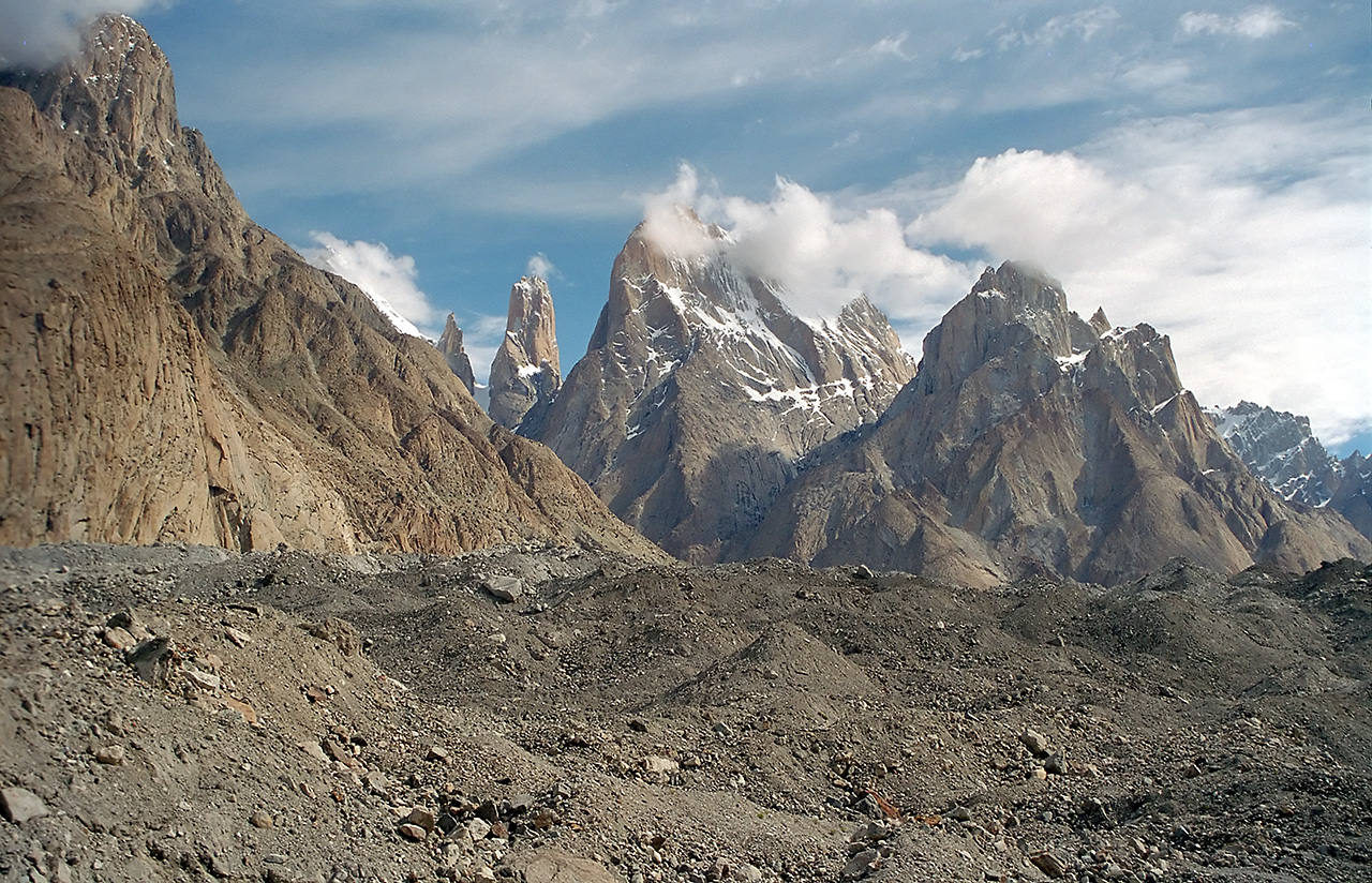 Trango Group (Baltoro-Glacier, Central-Karakoram, Pakistan)